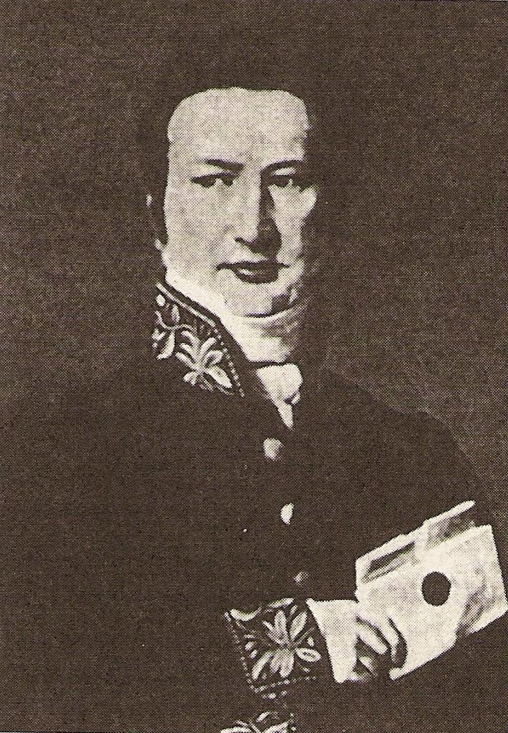 Johan Gunder Adler (1784 - 1852) Christian VIIIs kabinettsekretær